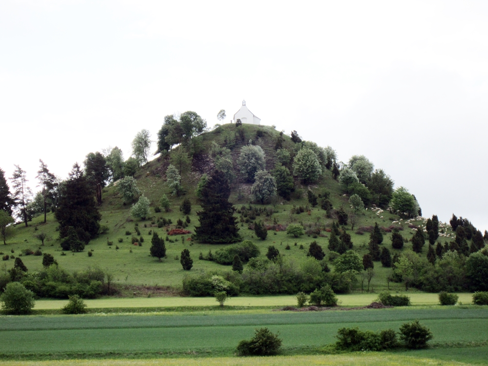 Kornbühl